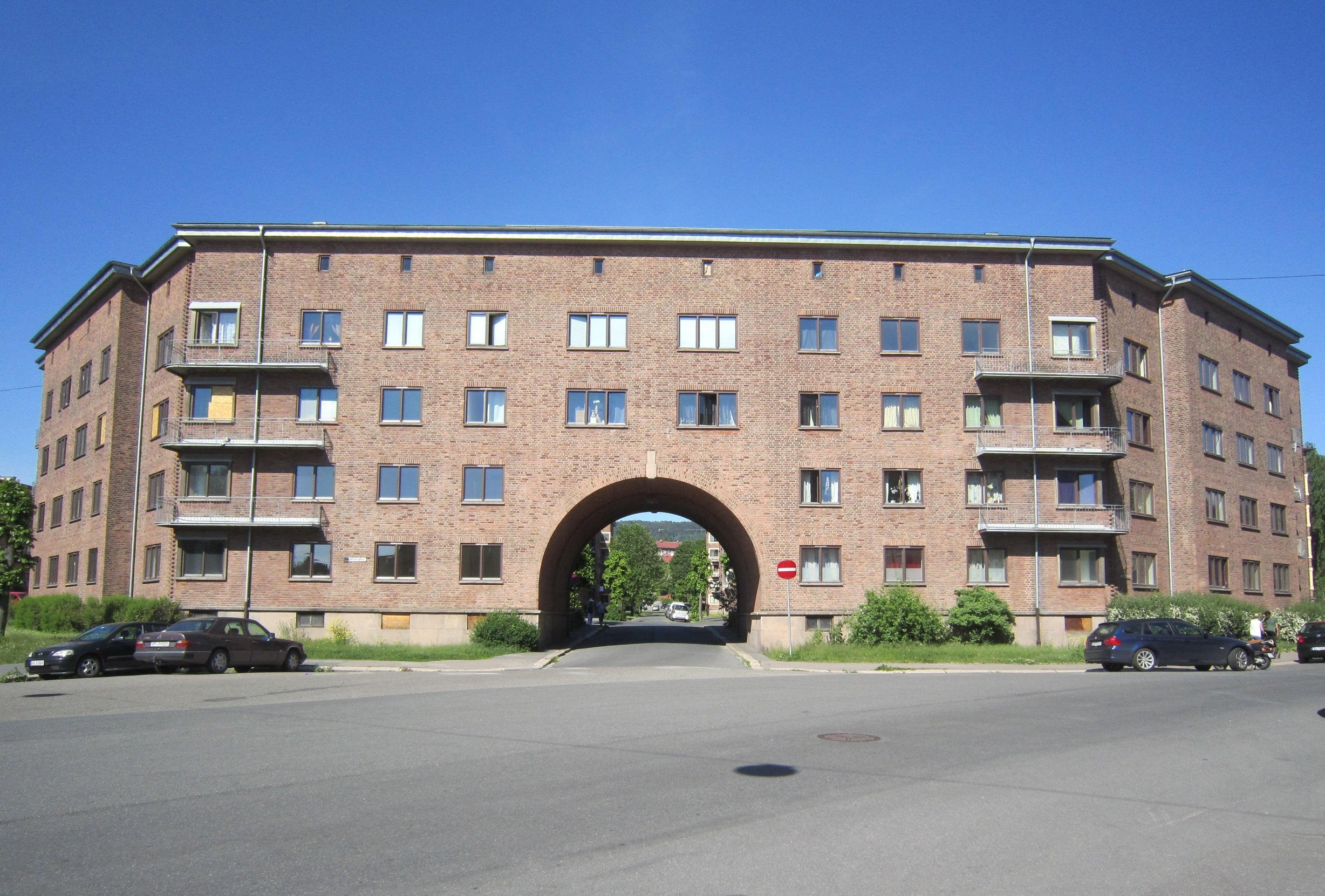 Sæveruds plass på Torshov i Oslo